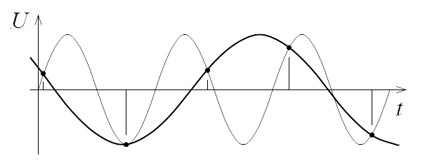 Alias-Bild als Folge von Unterabtastung